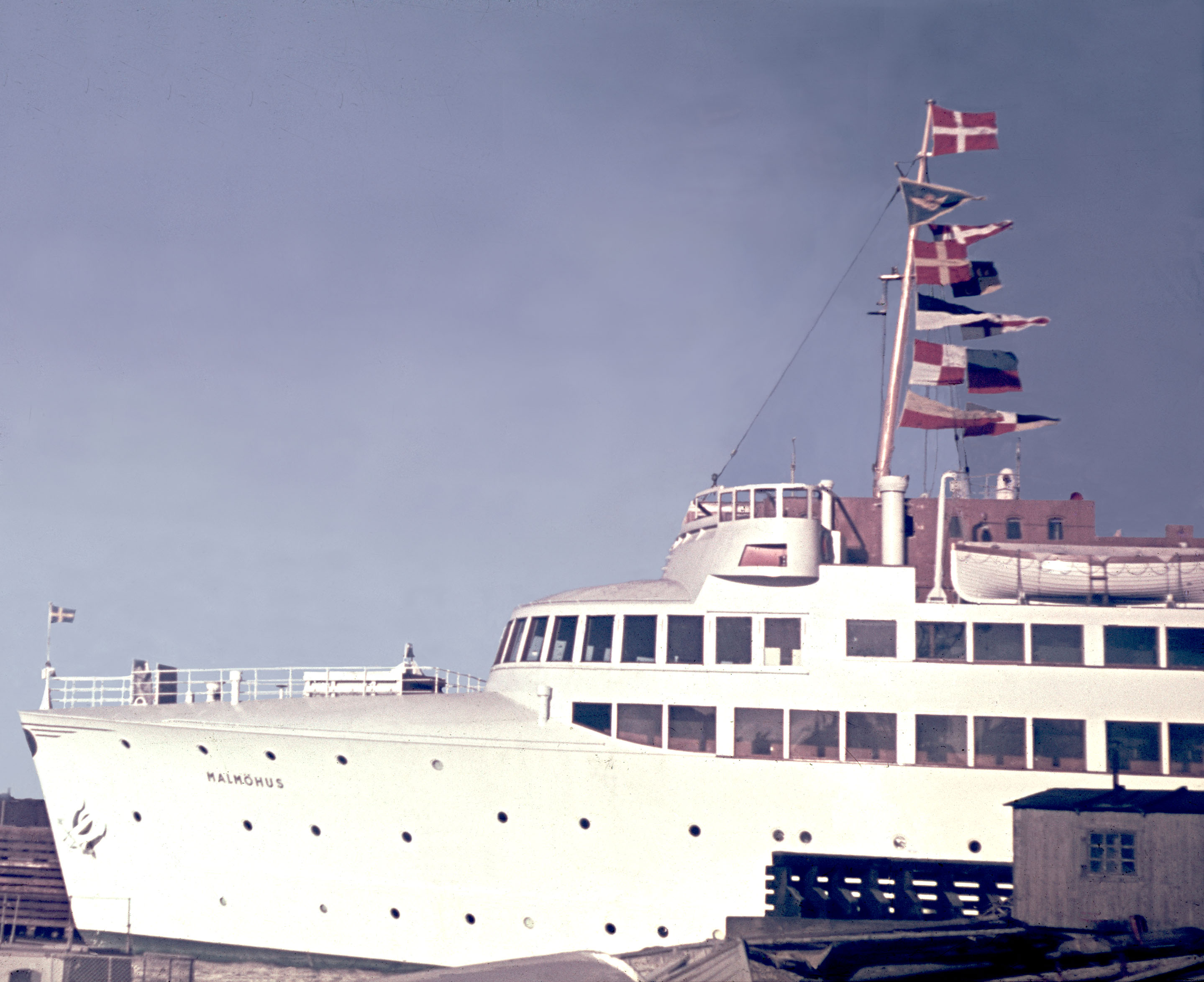 Tågfärjan Malmöhus år 1945.